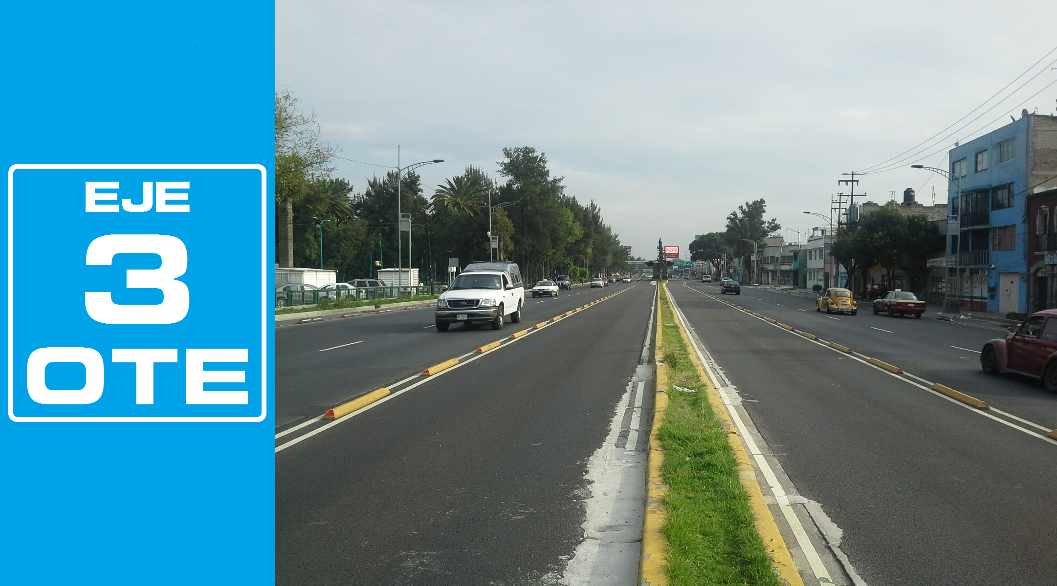 Rediseñado original de la señalética de los Ejes viales de la Ciudad de México por José García (Wiki ID: narumiyama)